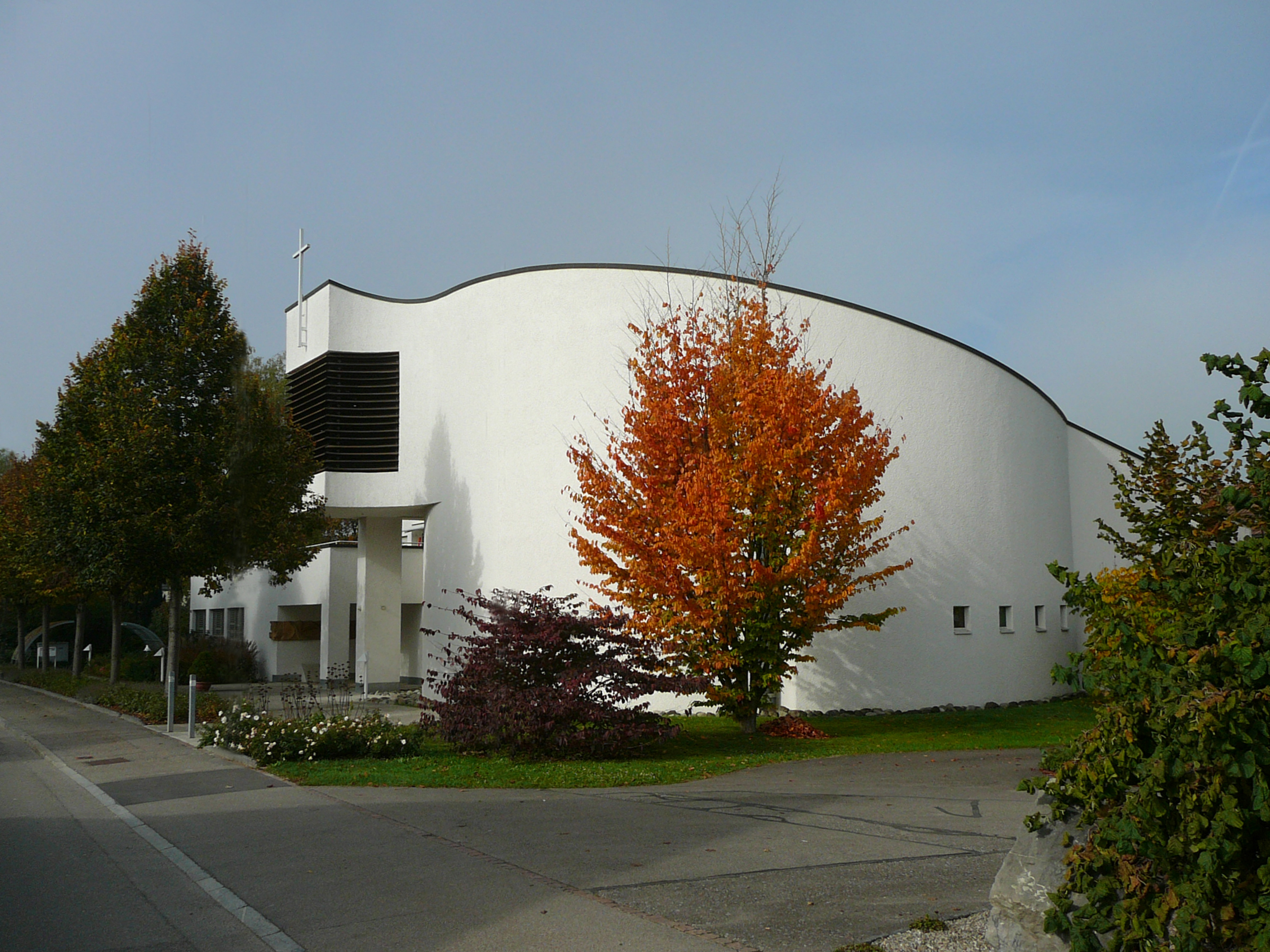 Römisch-katholische Auferstehungskirche St. Maria Magdalena Rafz, Aussenansicht